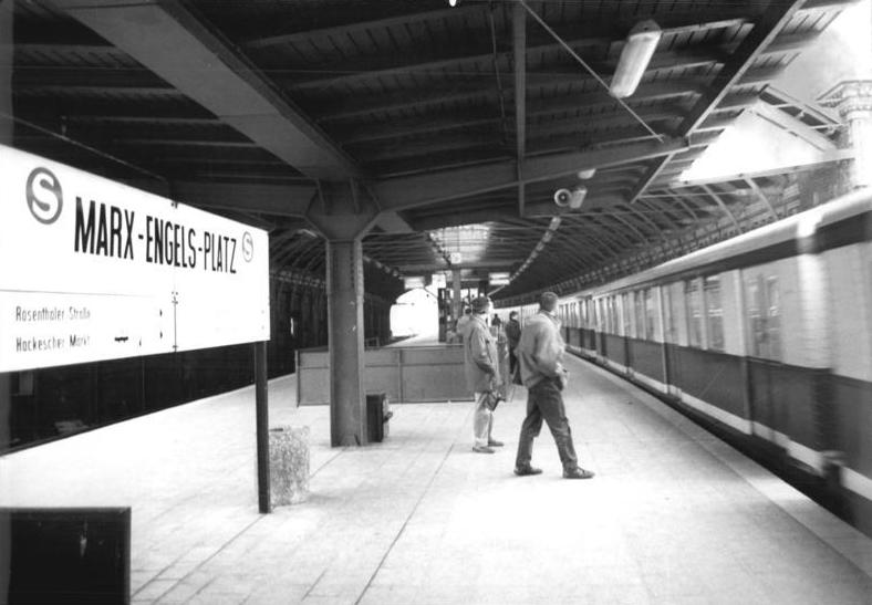 ADN-Grimm -Nomen est Omen oder Schall und Rauch? - Straßennamen in Berlin -30.1.91-Berlin-Der Berliner S-Bahnhof "Marx-Engels-Platz" zwischen Alexanderplatz und Friedrichstraße soll nach dem Vorschlag einer Kommission der Bezirksverordnetenversammlung künftig "Börse" heißen.